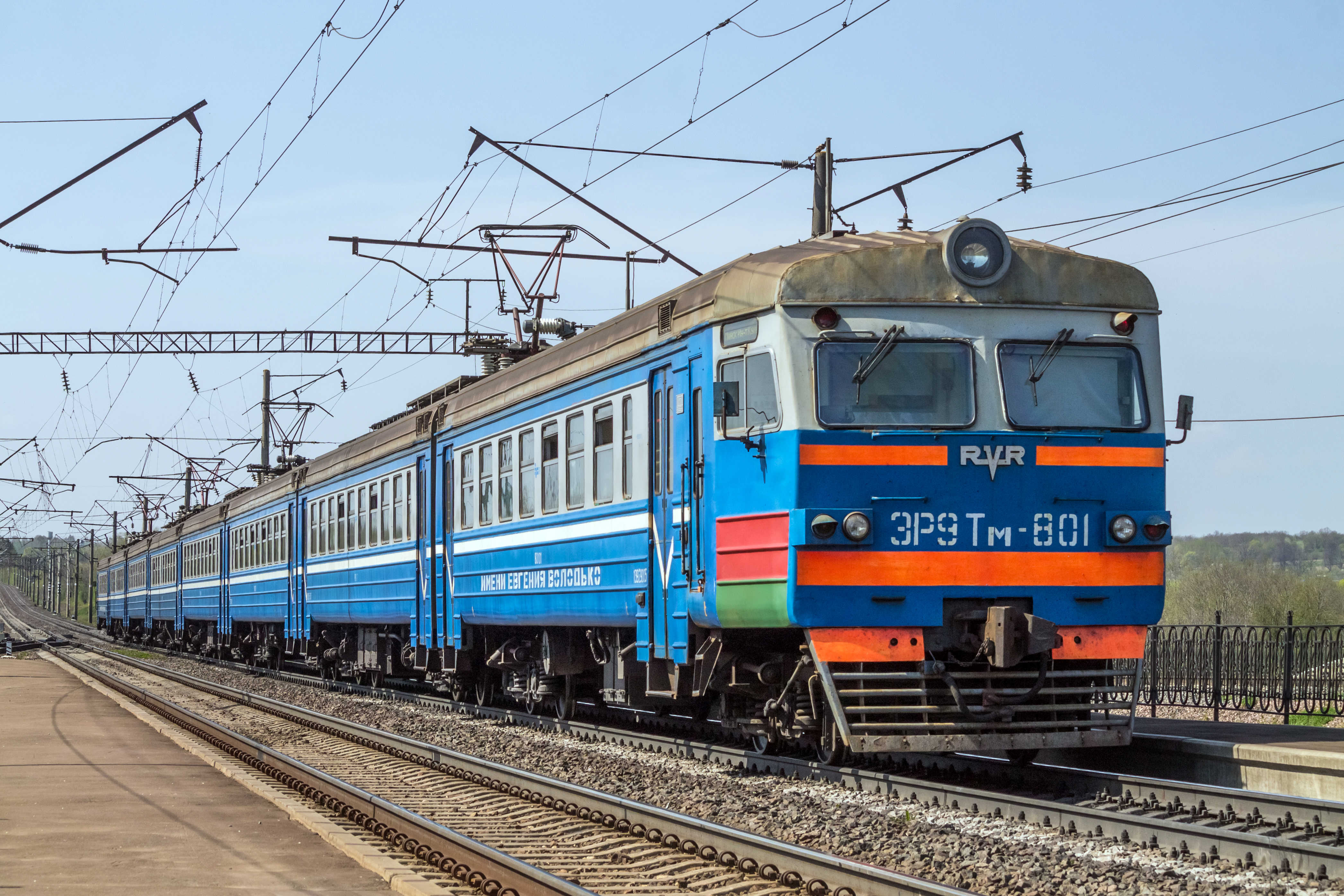 Электропоезд ЭР9ТМ-801, перегон Орша-Центральная, Белоруссия